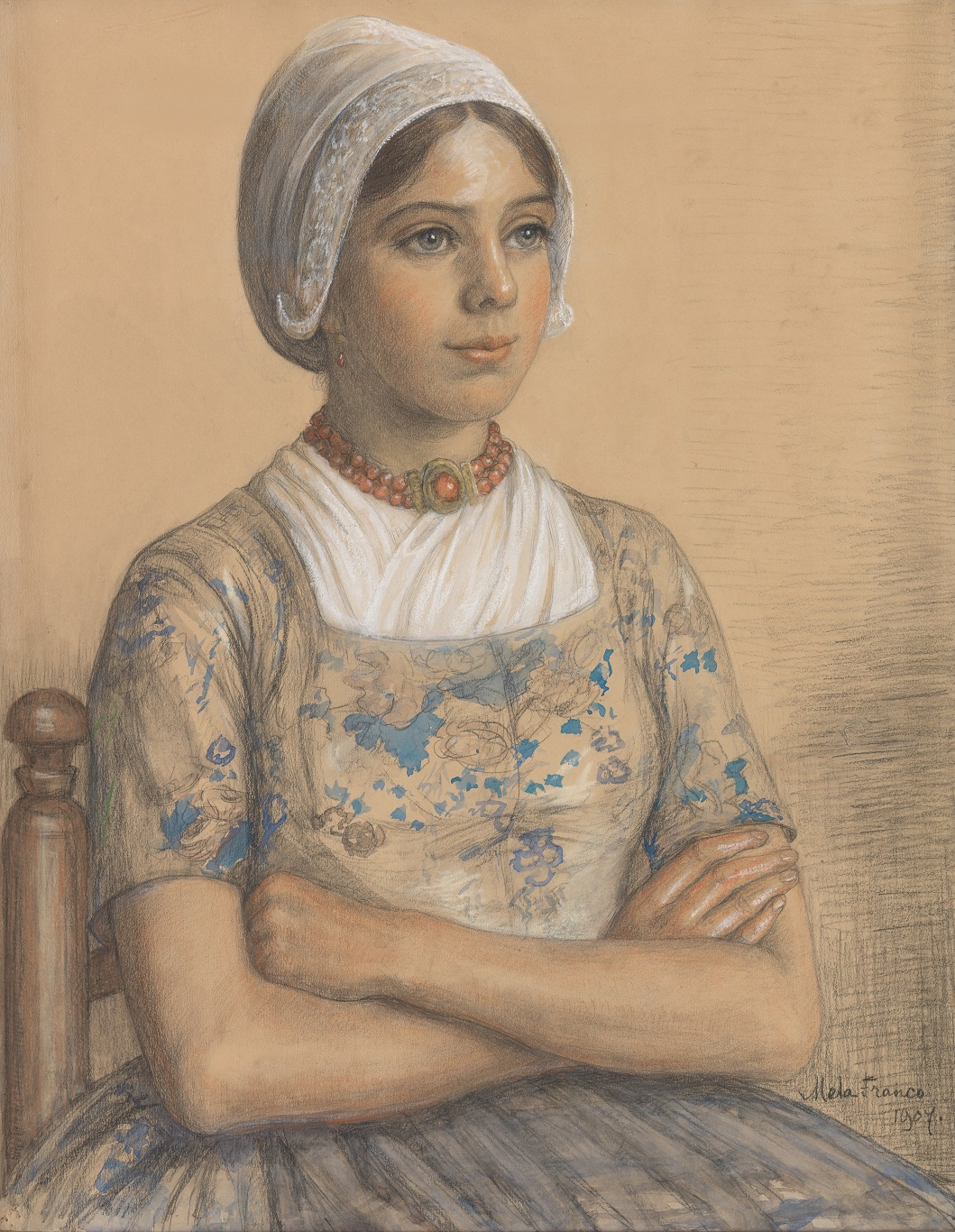 Meta Cohen Gosschalk, Meisje in Oud-Zaanse dracht, 1907, particuliere collectie